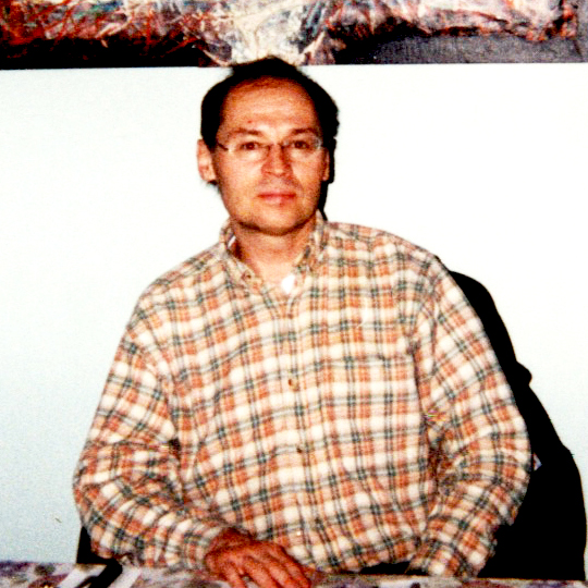 Sur cette photo, le Huron Wendat et sociologue de l'art Guy Sioui Durand (2001).